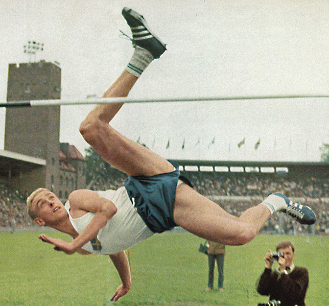 Jan Dahlgren